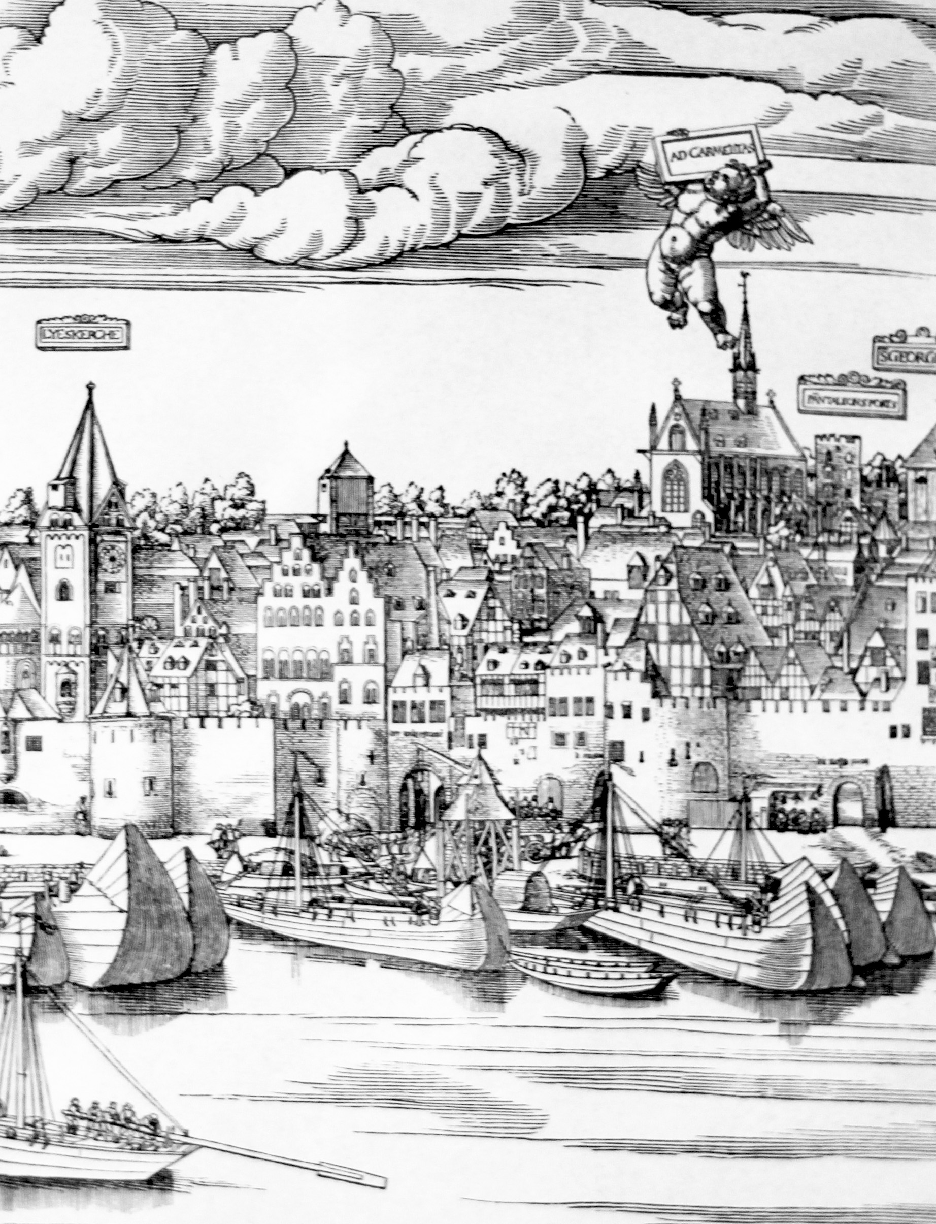 Kölner Rheinmauer bei St. Maria Lyskirchen. Der Ausschnitt zeigt nach Norden das zwischen Halbtürmen gelegene Filzengrabentor. Darstellung nach Anton Woensams Holzschnitt von 1531